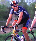 Lance Armstrong, afkomstig van het Amerikaanse National Institutes of Health. Origineel op: "The majority of information at this site is in the public domain. Unless stated otherwise, documents and files on NIH web servers can be freely downloaded and reproduced"